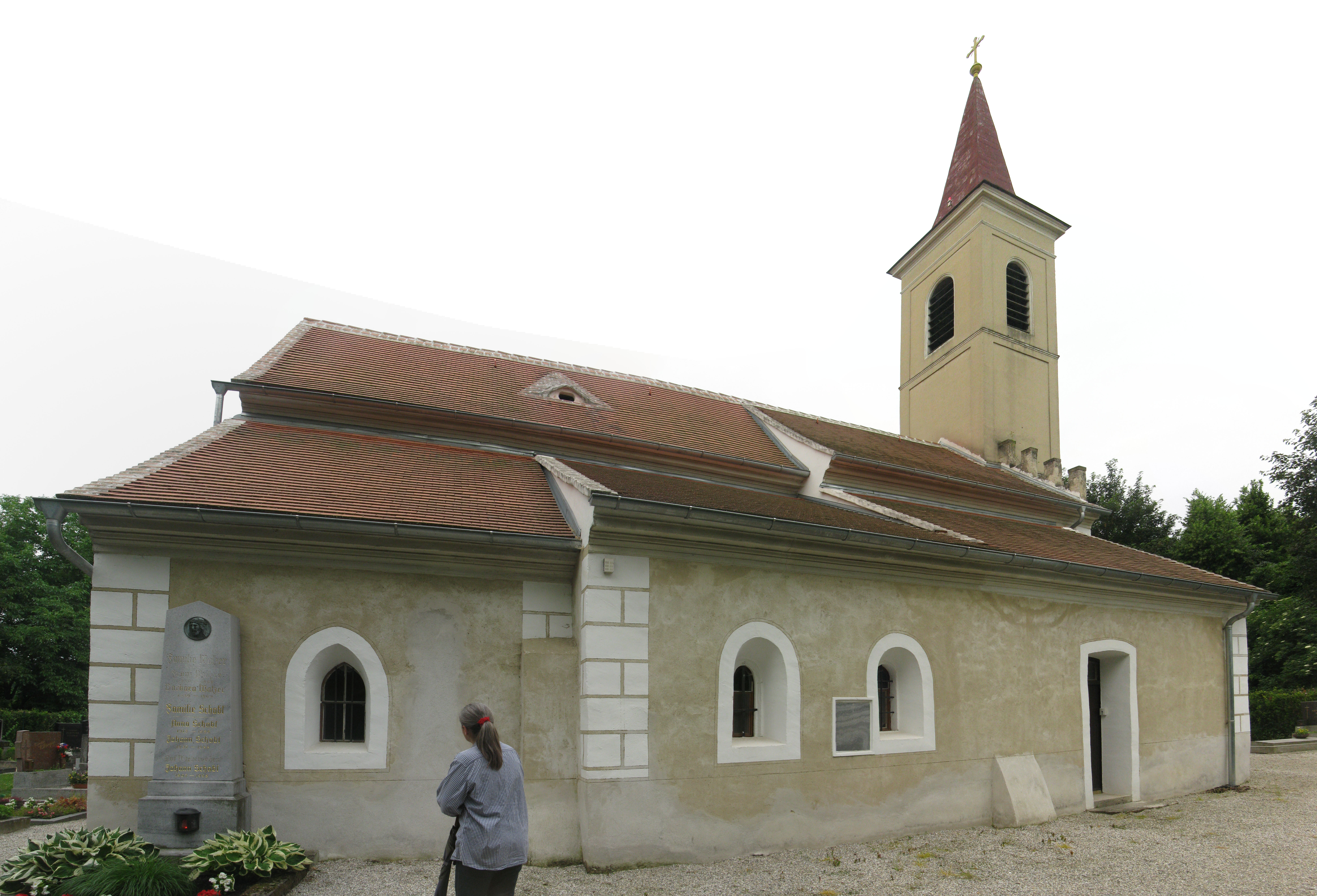 Kath. Filialkirche hl. Nikolaus